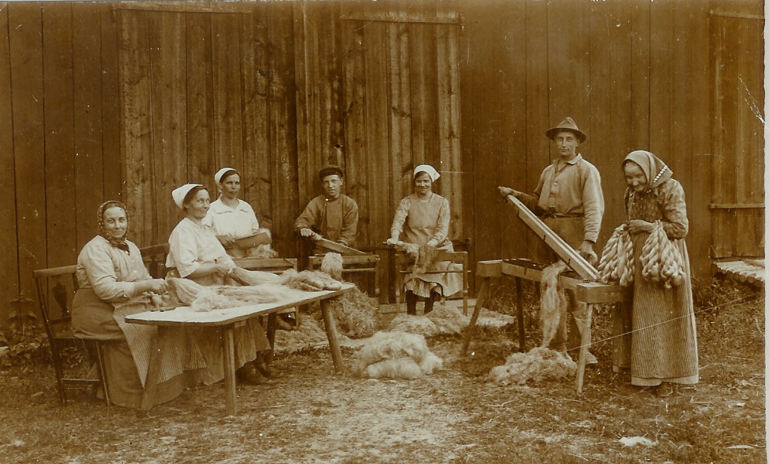 Linbearbetning hos "Masarns" i Övre Fornby, By socken, Dalarnas län, någon gång omkring 1920.